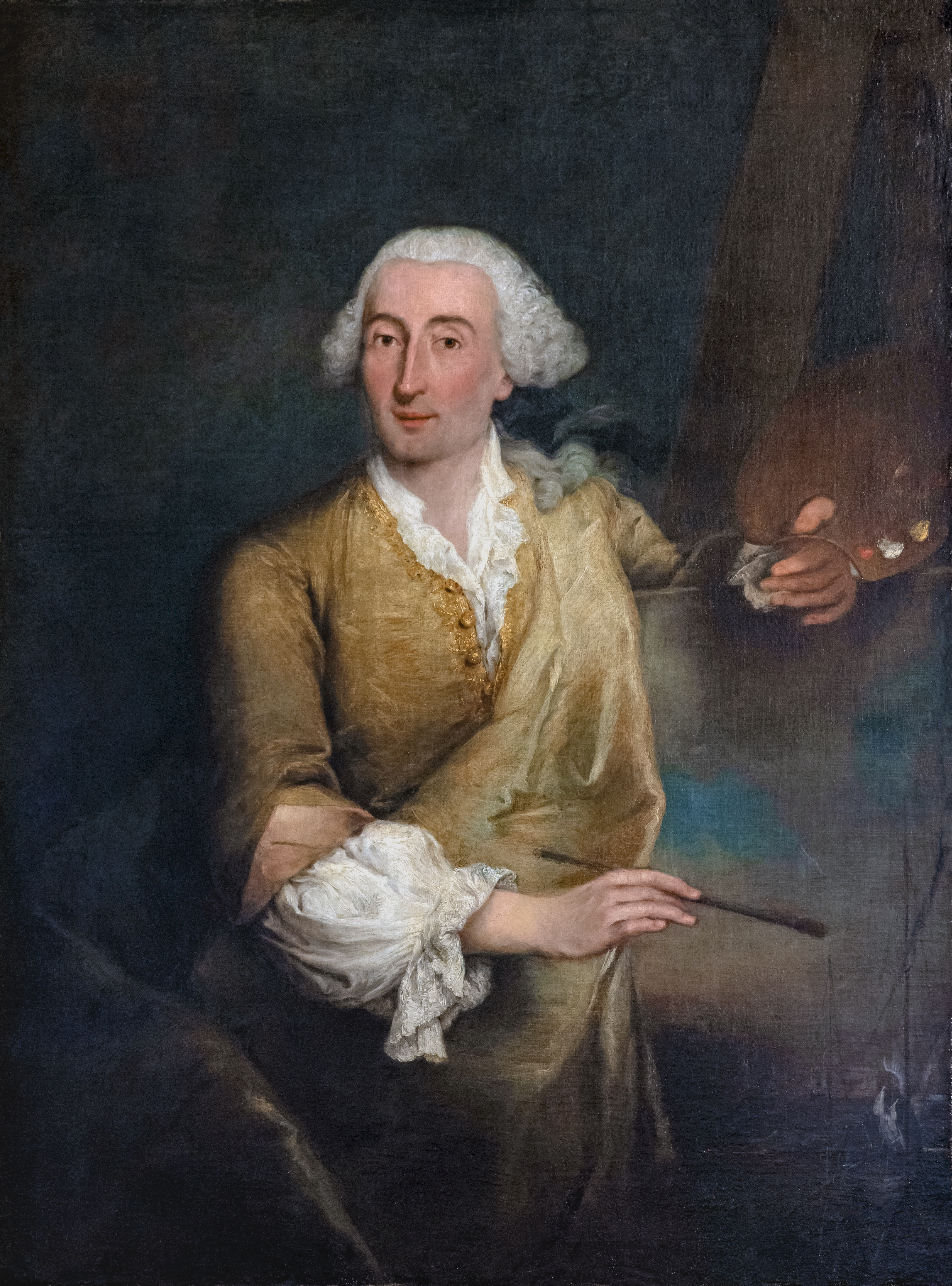 Depicted person: Francesco Guardi – Italian painter (1712-1793)